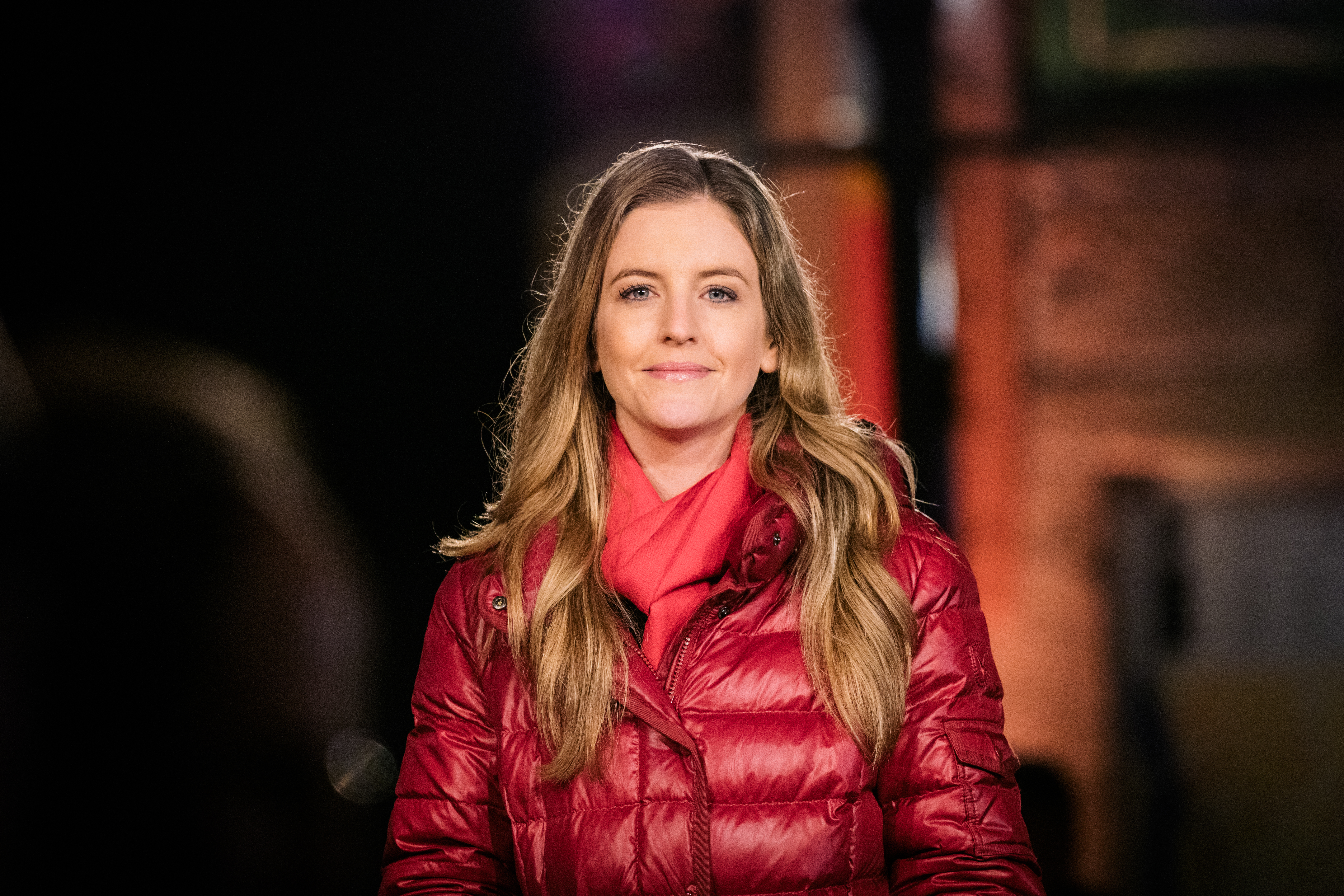 DIe Fernsehmoderatorin Jennifer Sieglar vor dem Wanfrieder Rathaus anlässlich einer Live-Sendung zum Thema 30 Jahre Mauerfall.